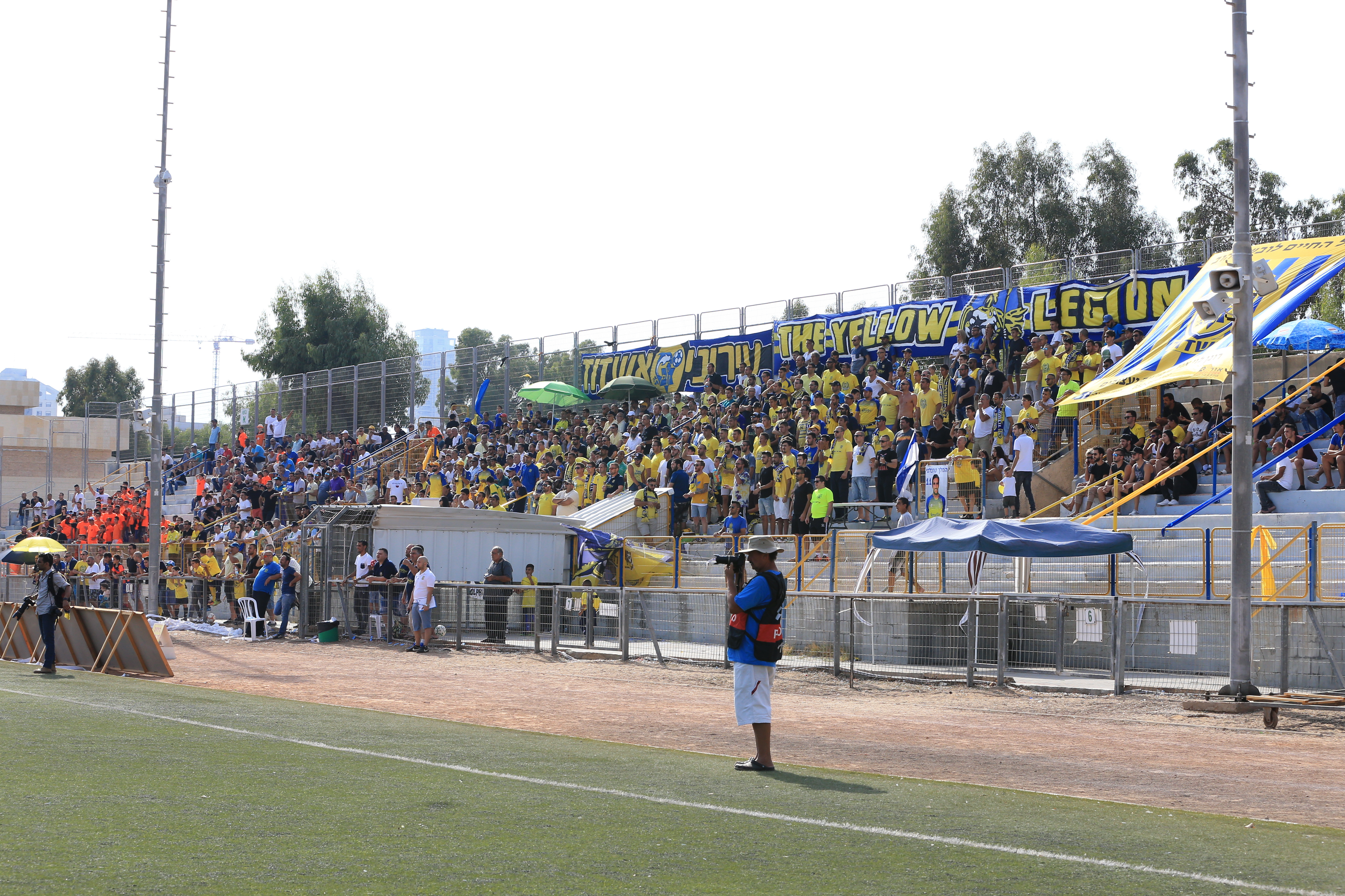 יציע אוהדי עירוני אשדוד במשחק ליגה מול מכבי קריית מלאכי